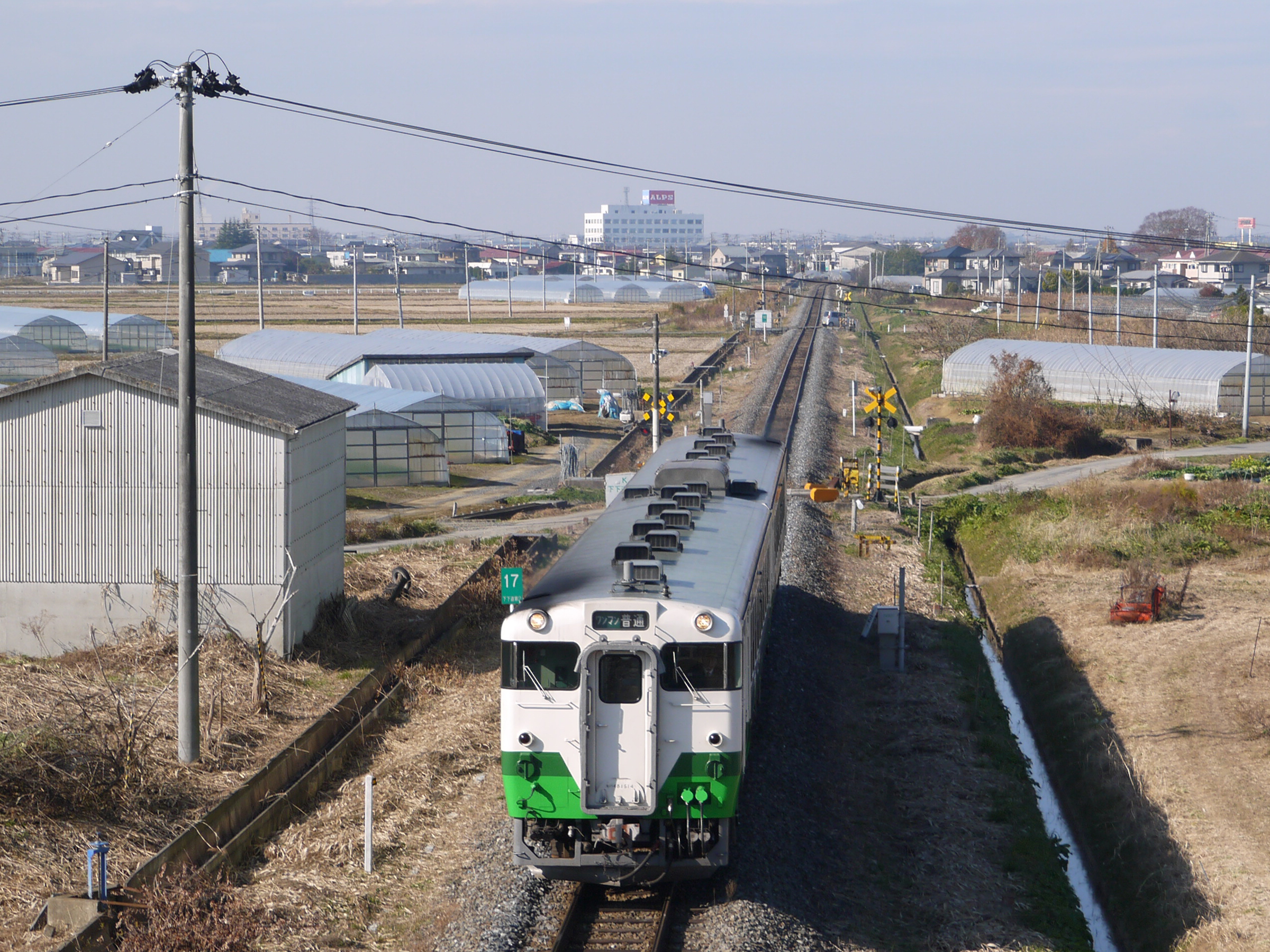 JR石巻線を走るキハ48形車両（湧谷～前谷地）